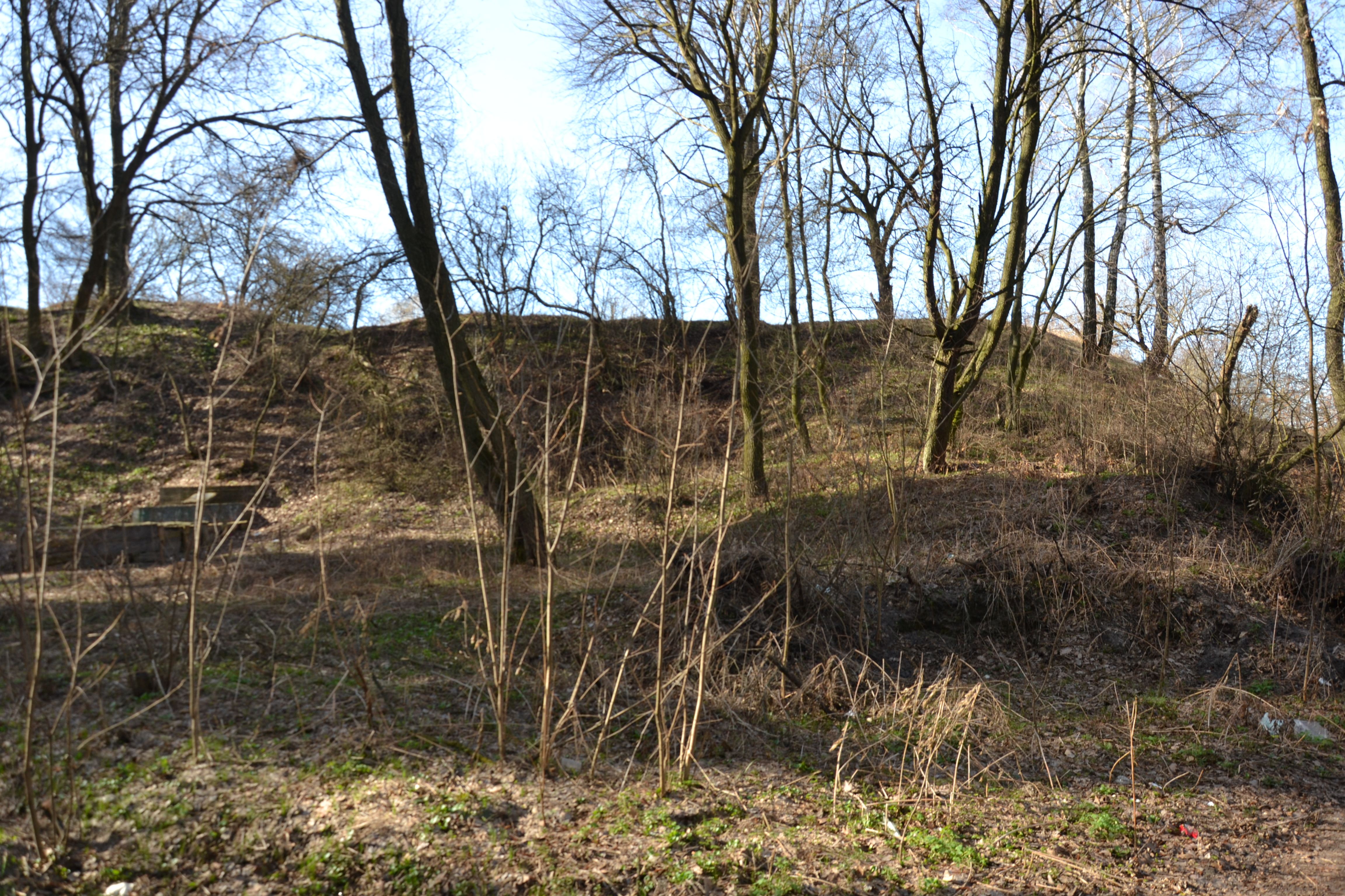 Городище Віта-Поштова, схил валу знизу 2